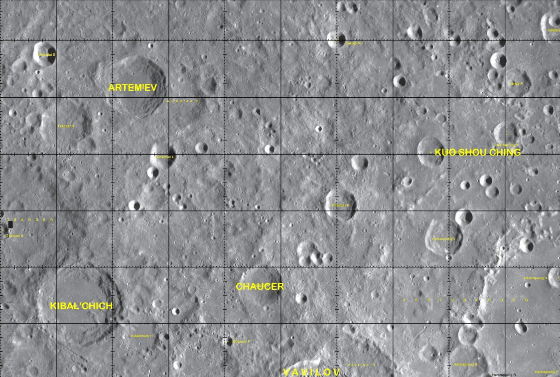 Cráter Chaucer (LRO)